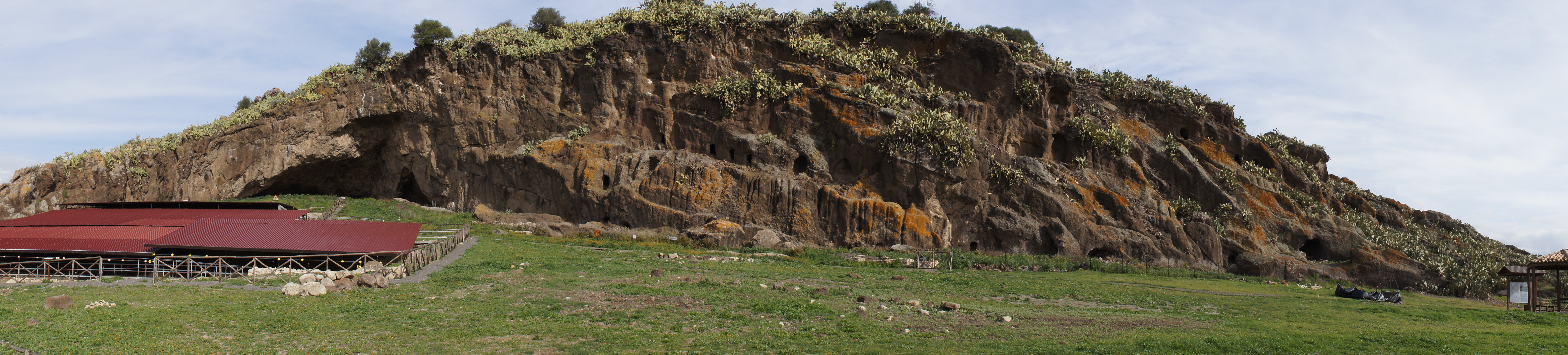 Area archeologica di Rocchicella Mineo (CT) Santuario dei Palici